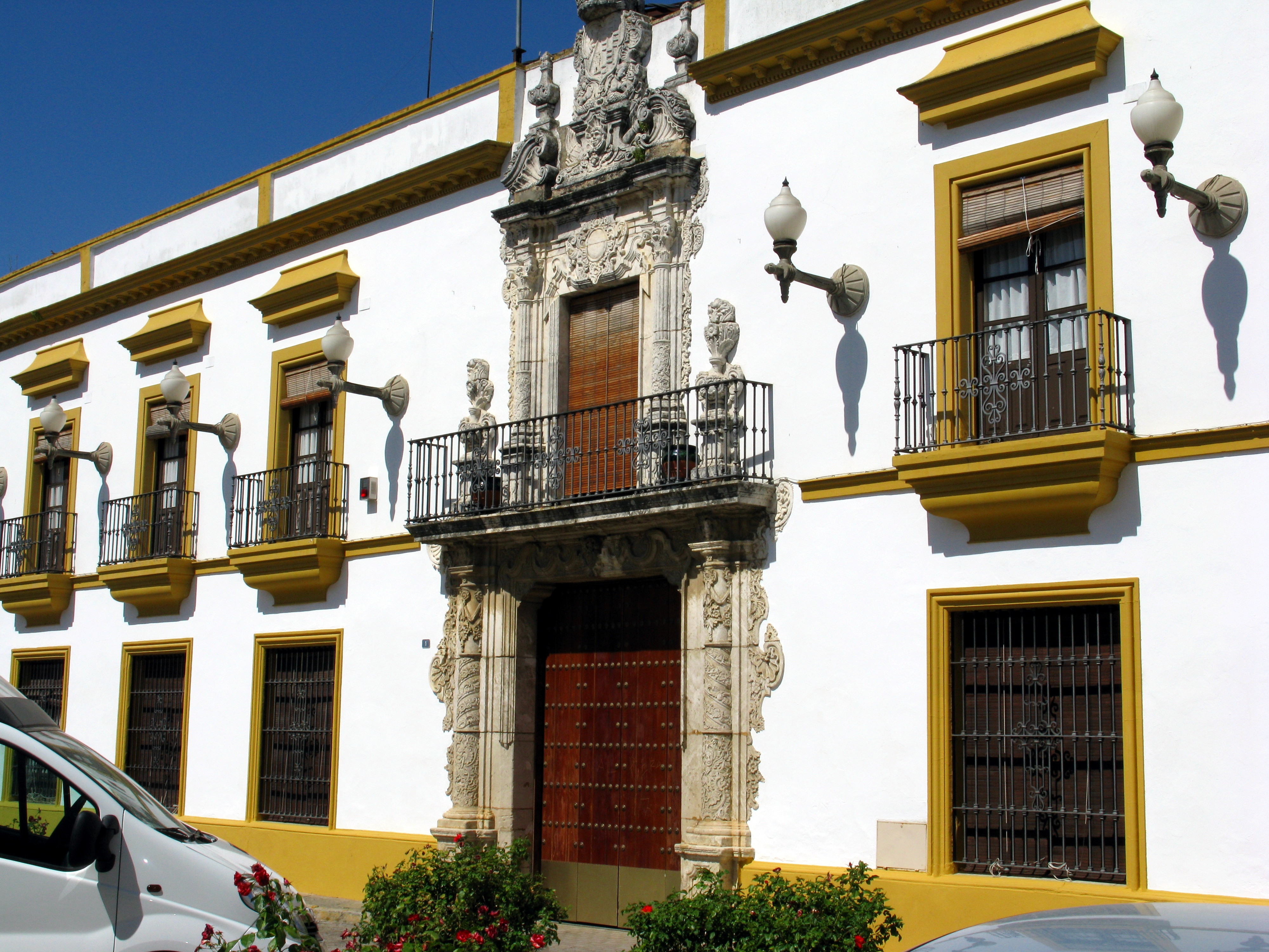 Fachada principal del Ayuntamiento de Utrera (Sevilla, España). Antiguo palacio de Vistahermosa. Su portada rococó es de 1730. En su interior podemos destacar sus salones románticos e historicistas.